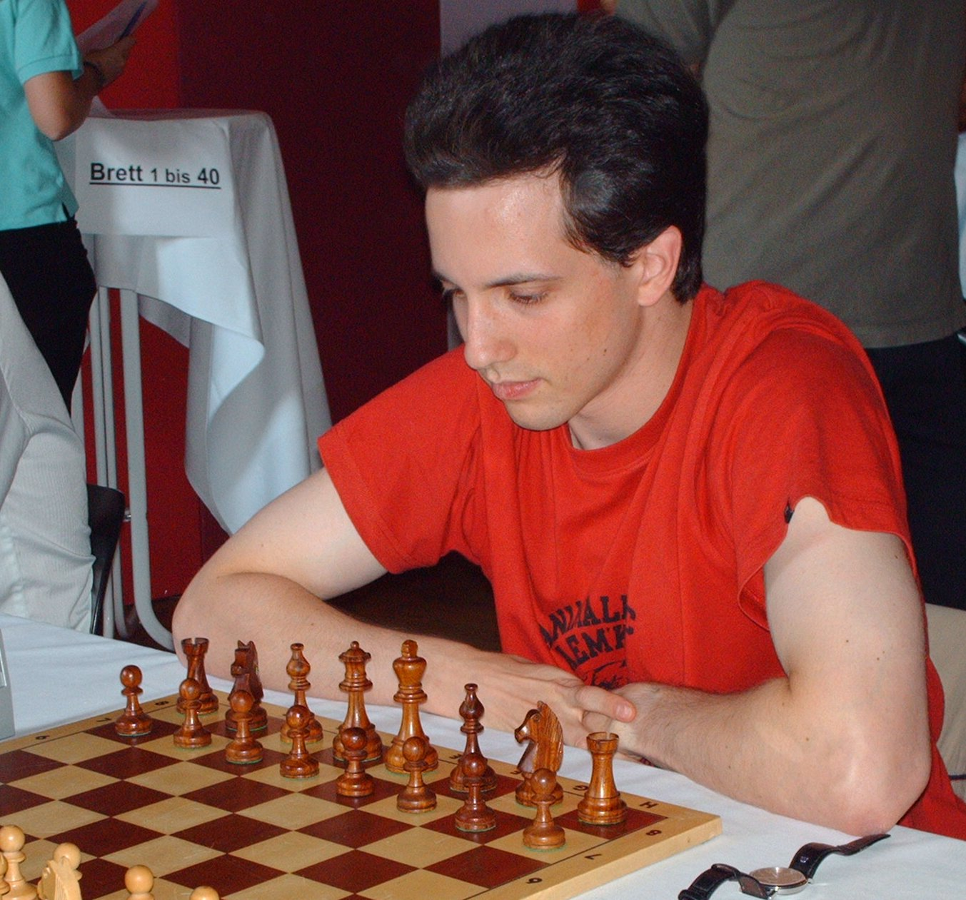 Leonid Kritz am 16. Juni 2007 beim Schachfestival im Jüdischen Museum Berlin